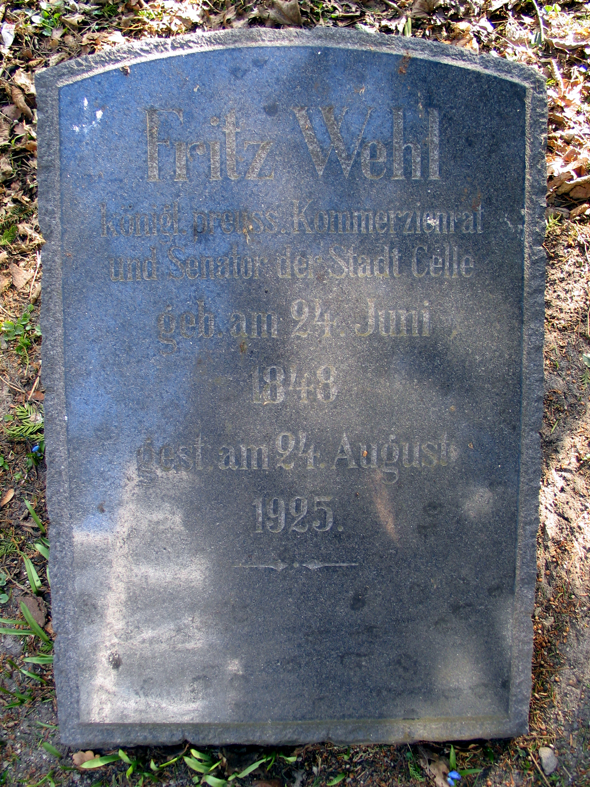 Foto vom Helentorfriedhof, östlicher Teil ...